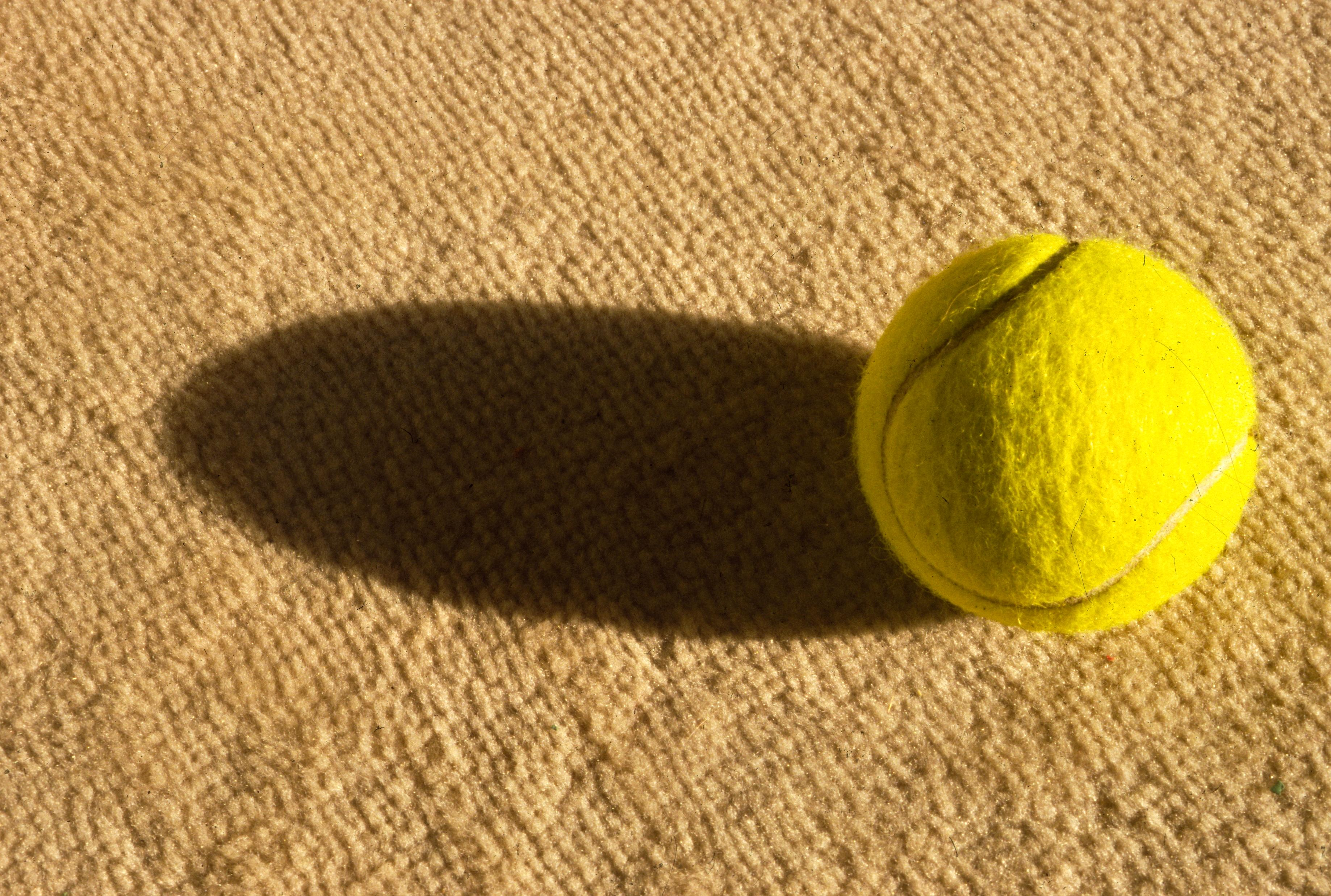 Tennisball